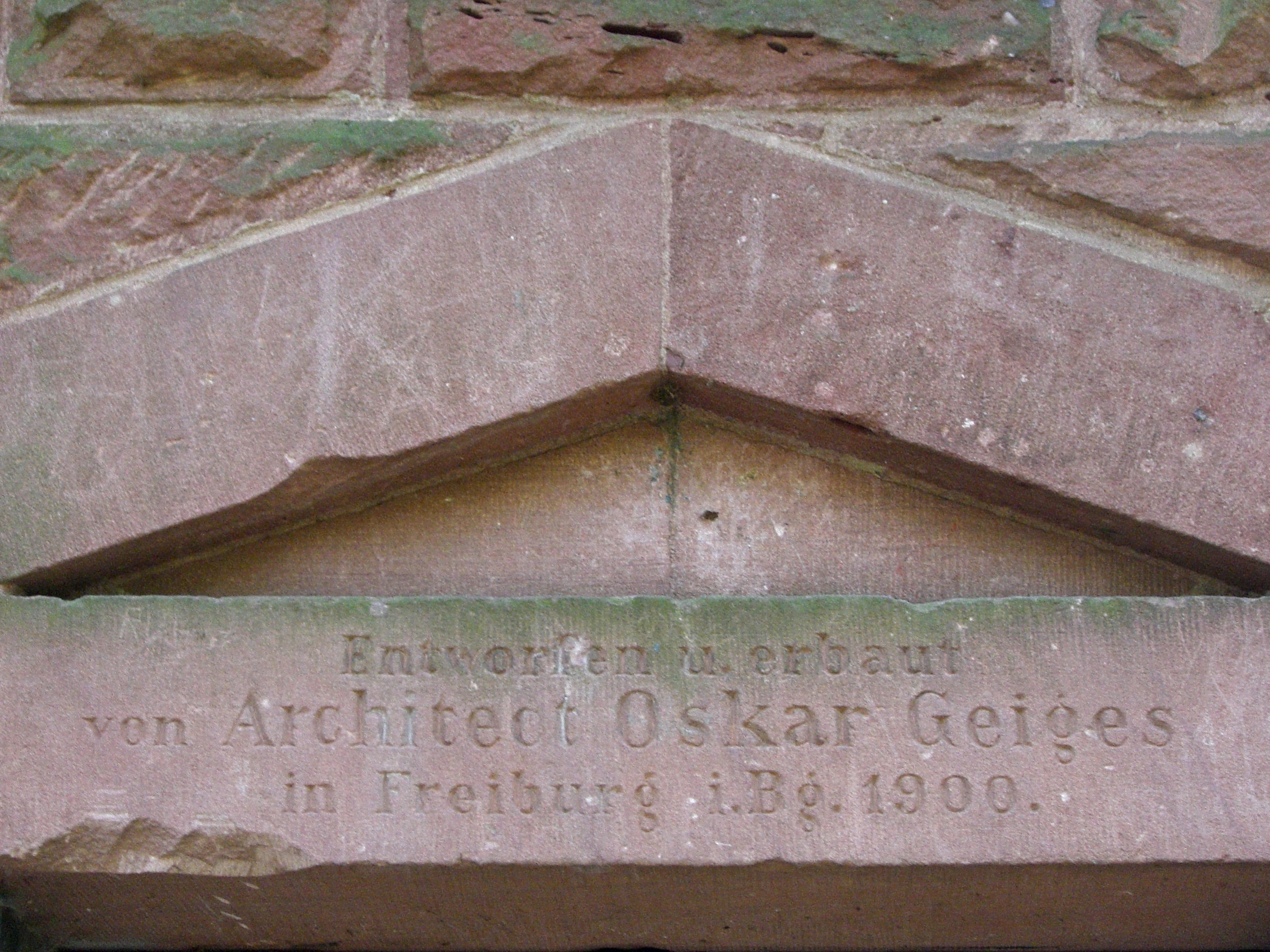 Inschrift: Entworfen und erbaut von Architekt Oskar Geiges in Freiburg im Breisgau 1900.